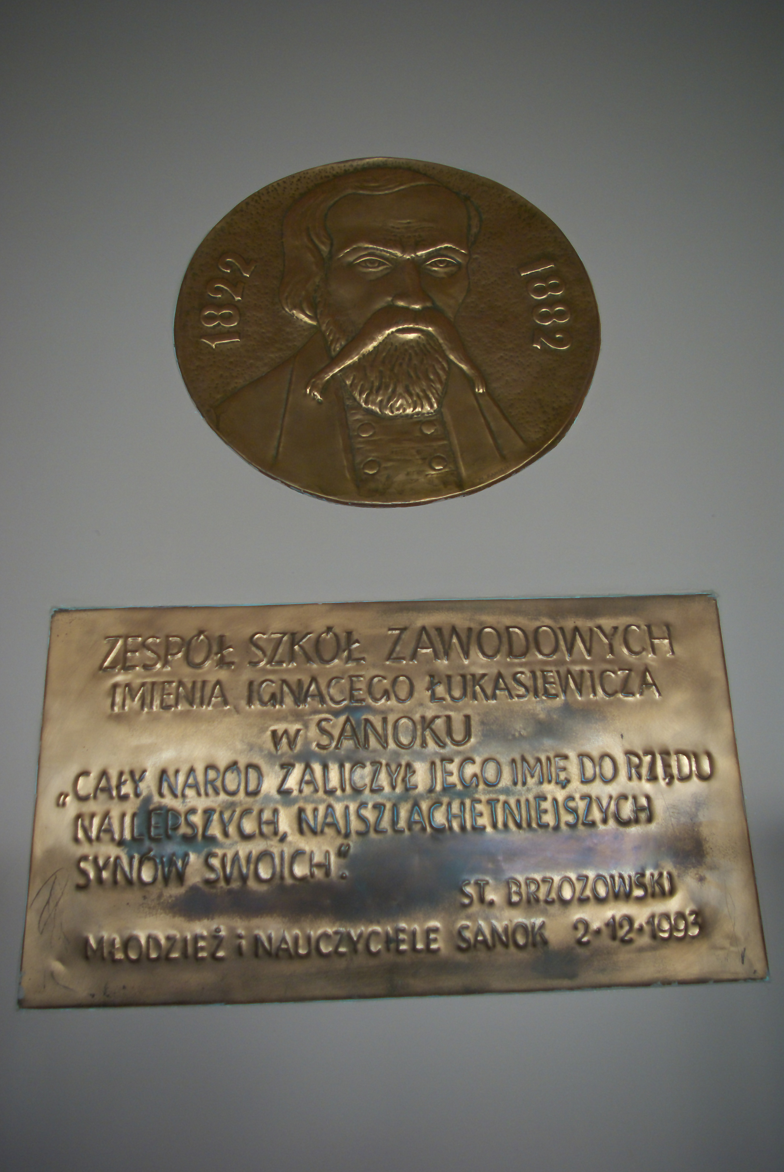 Zespół Szkół Nr 5 w Sanoku. Tablica pamiątkowa i wizerunek Ignacego Łukasiewicza